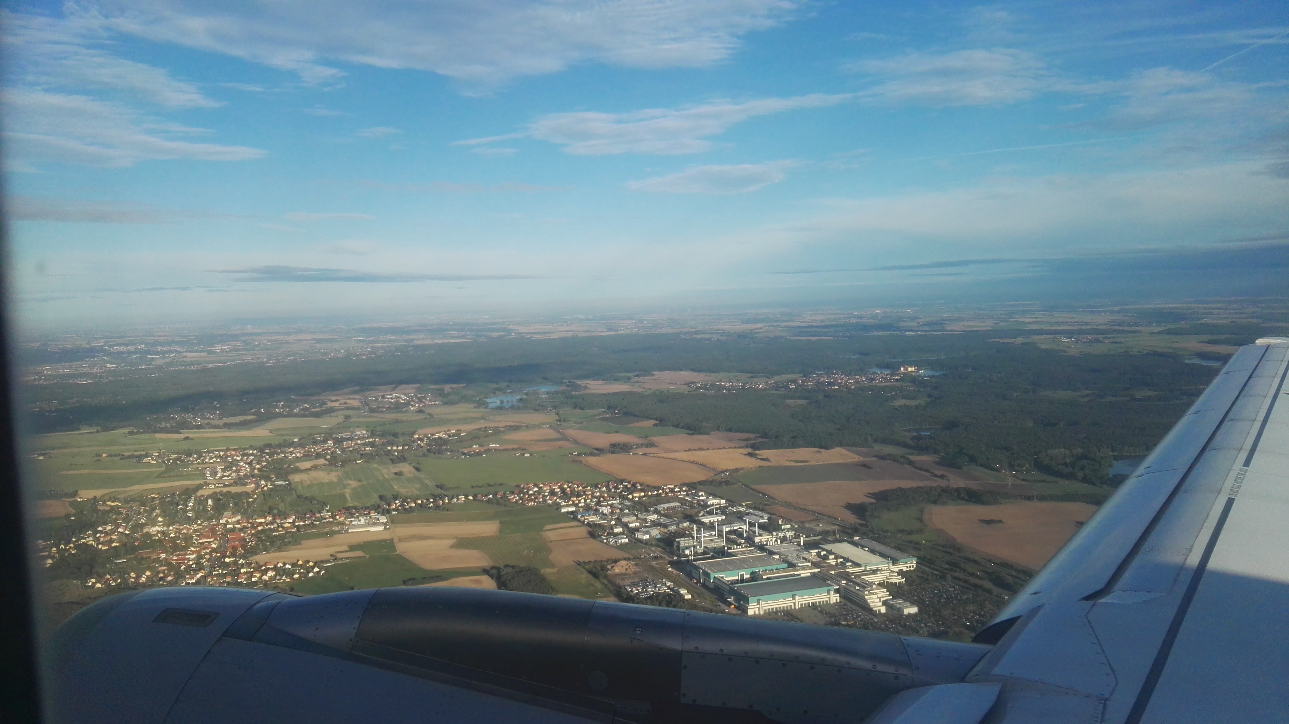 GLOBALFOUNDRIES, Dippelsdorfer Teich, Schloss Moritzburg